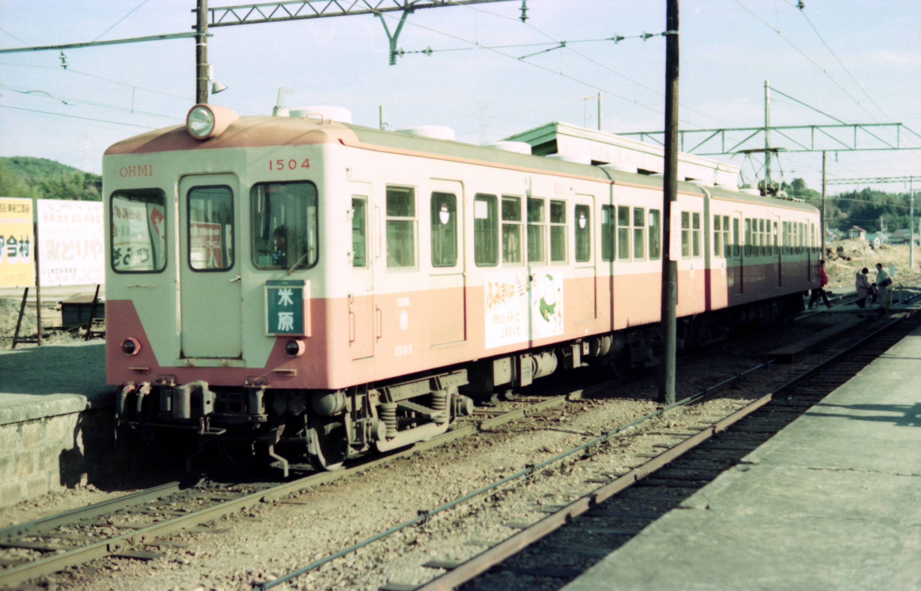 近江鉄道 ５００系 １５０１ 貴生川駅 Ｓ５６頃